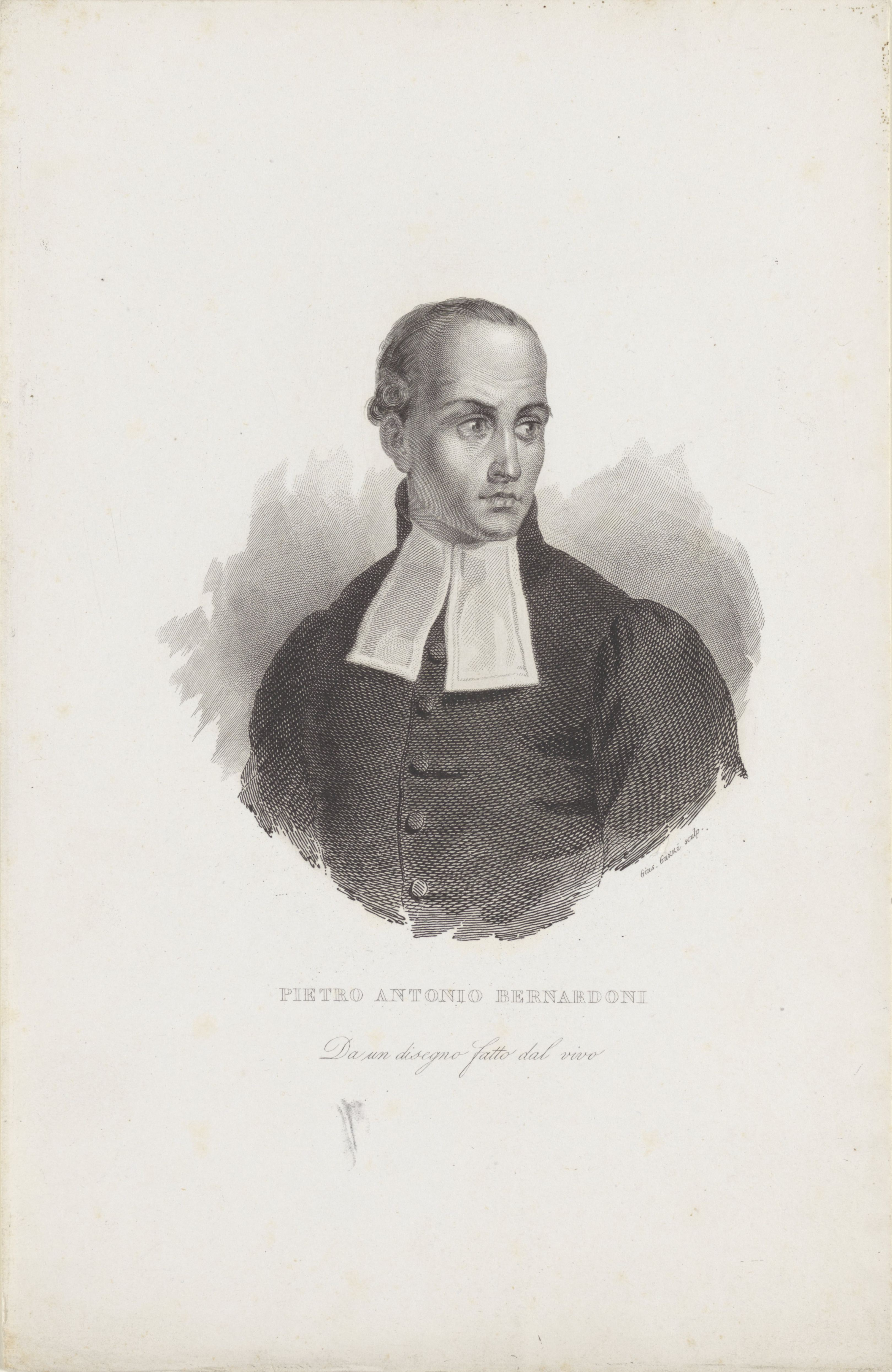 IdentificatieTitel(s): Portret van dichter Pietro Antonio BernardoniObjecttype: prent Objectnummer: RP-P-1909-4977Opschriften / Merken: verzamelaarsmerk, verso, gestempeld: Lugt 2228VervaardigingVervaardiger: prentmaker: Giuseppe Guzzi (vermeld op object)naar tekening van: onbekend (vermeld op object)Plaats vervaardiging: ItaliëDatering: 1834 - 1842Fysieke kenmerken: gravureMateriaal: papier Techniek: graveren (drukprocedé)Afmetingen: blad: h 268 mm (Binnen plaatrand afgesneden.) × b 175 mm (Binnen plaatrand afgesneden.)OnderwerpWat: historical personswriter, poet, authorportrait of a writerWie: Pietro Antonio BernardoniVerwerving en rechtenVerwerving: aankoop 1905Copyright: Publiek domein